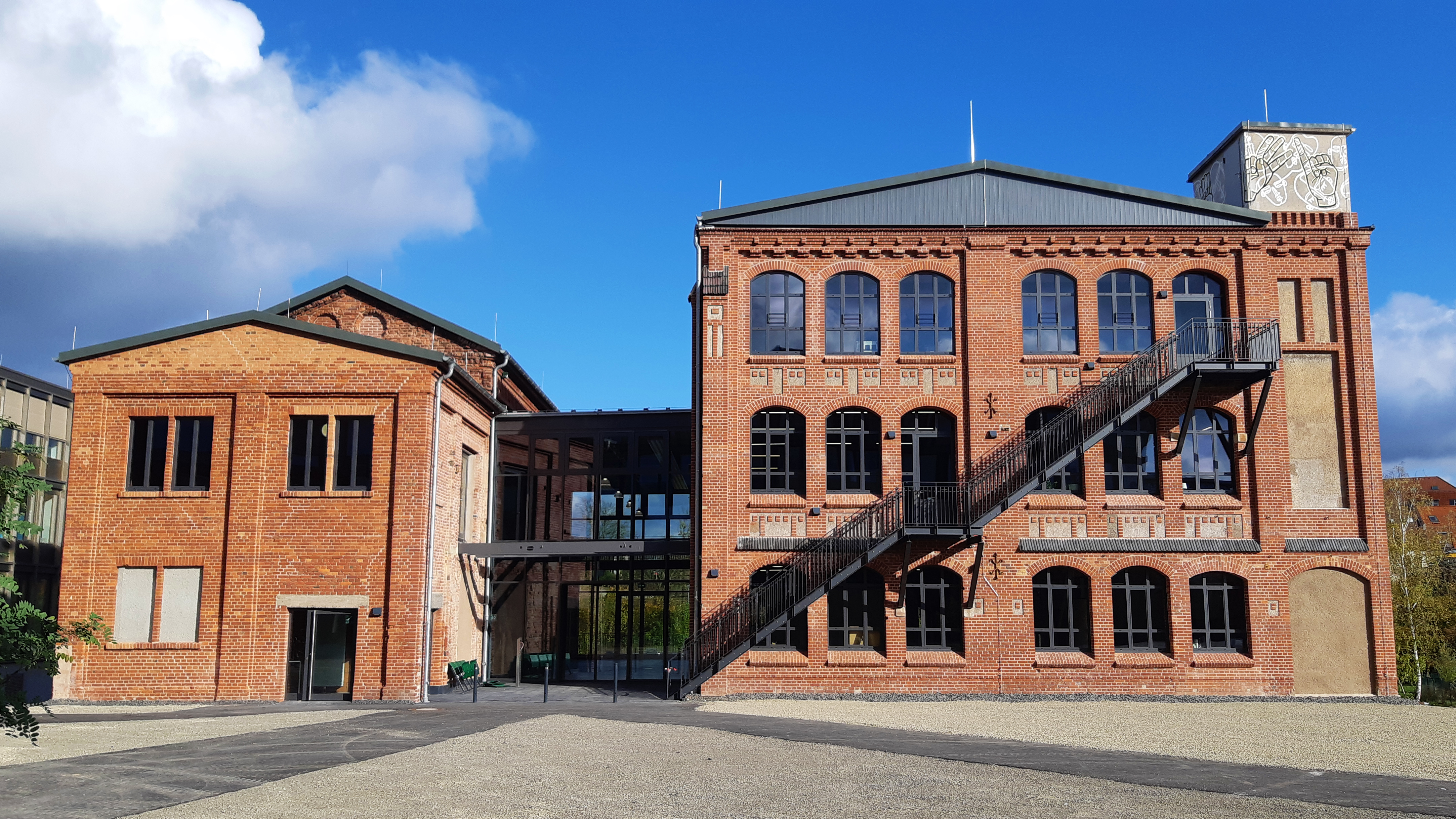 Das Studierendenhaus der Uni Kassel auf dem zentralen Campus Holländischer Platz wurde 2019 eingeweiht. Es bietet Platz für den AStA, studentische Initiativen und das Veranstaltungszentrum "Färberei".